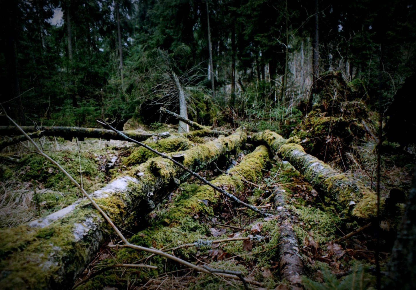 Autor: Adrian Grzegorz